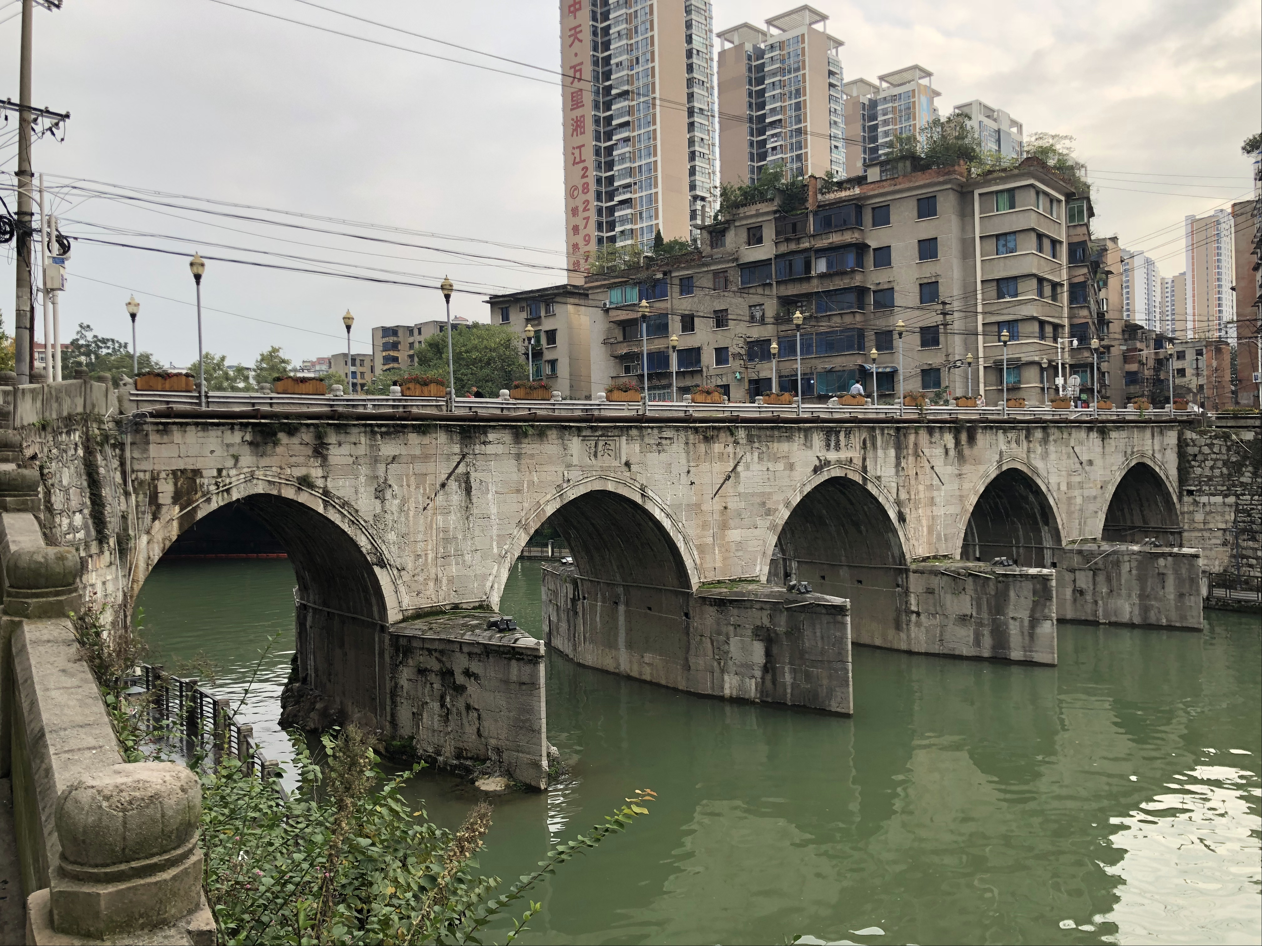 中文（中国大陆）: 狮子桥 遵义